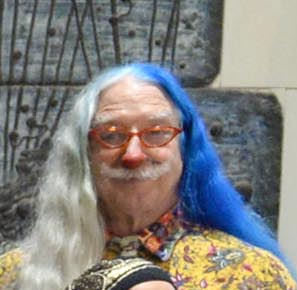 נשיא מדינת ישראל ראובן ריבלין בטקס הענקת "פרס דניאלי לרפואה עם לב" לרופאות, רופאים ואחיות מתחום האונקולוגיה כהוקרה על טיפול יוצא דופן בחולים זוכי פרס דניאלי יחד עם (מימין לשמאל) שרת המשפטים איילת שקד, שר החינוך נפתלי בנט, נשיא המדינה, שר הבריאות יעקב ליצמן ואלי ישי. מימין עומד פאץ' אדאמס יתר הזוכים לא לפי סדר הופעתם בתמונה: פרופ' דינה בן יהודה, ד"ר אביבית נוימן-אורבך וד"ר הילה מגן, ד"ר טליה גולן פרופ' נתן צ'רני ד"ר שי יגנה אסנת אבנעים יעל אורבך מאיה קריחלי מרים פנחס רונית גולד רחל (דנצי) הוס לזיהוי מקבלי הפרס ראו כאן